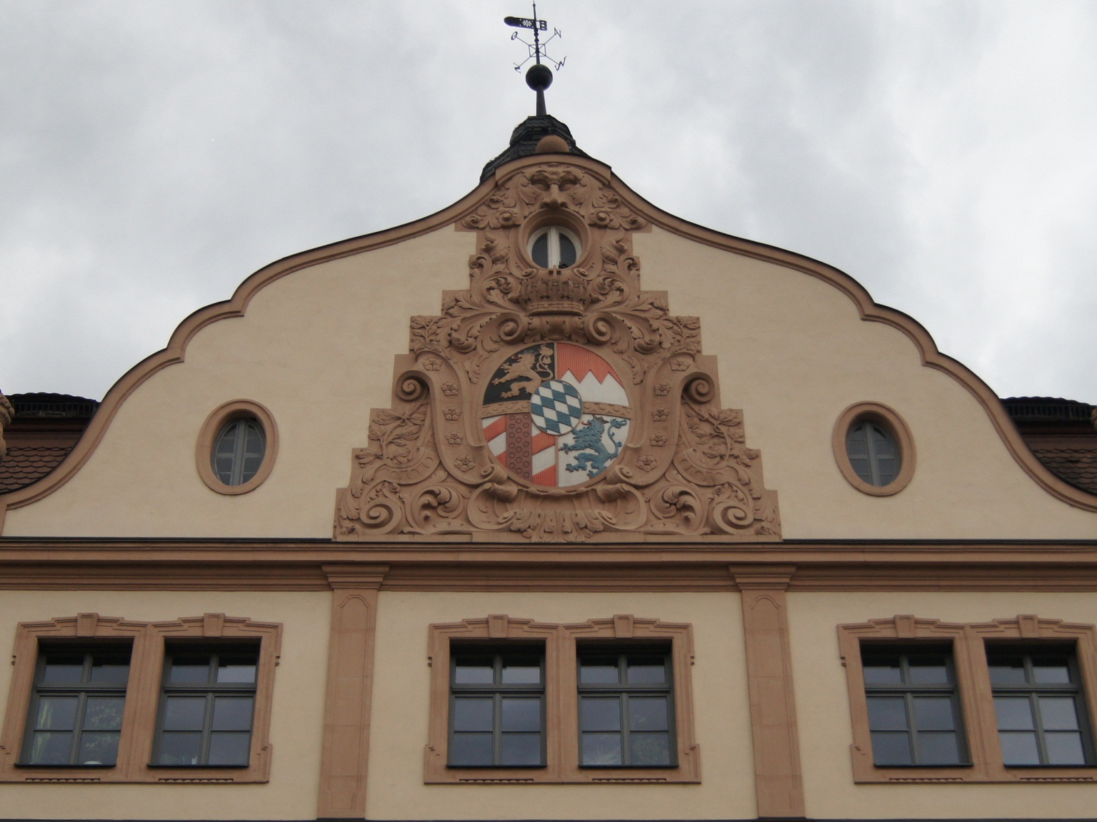 ehemaliges Hauptzollamt in Würzburg, Zwerchhaus und Wappen